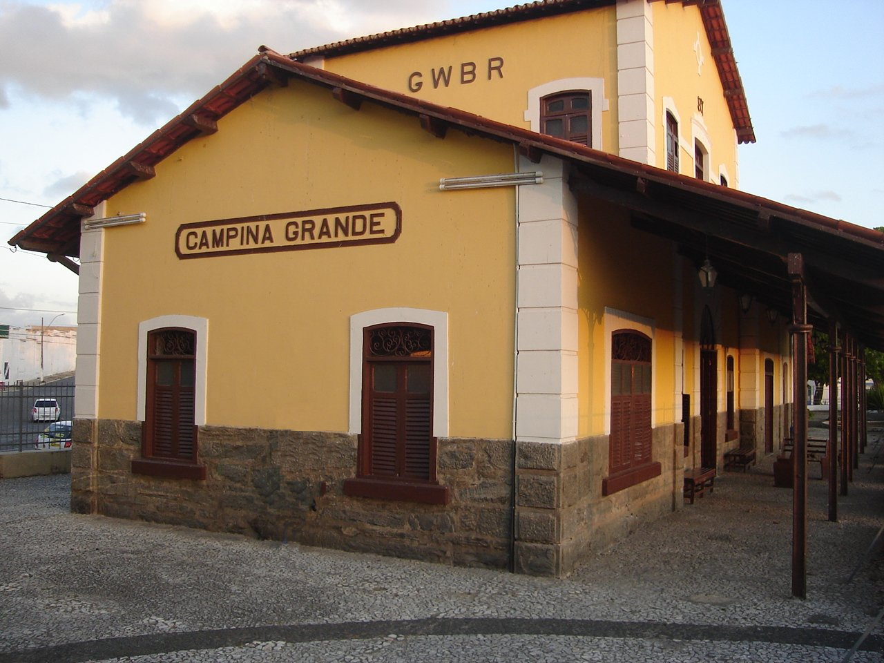 Ferrovia de Campina Grande, Brasil